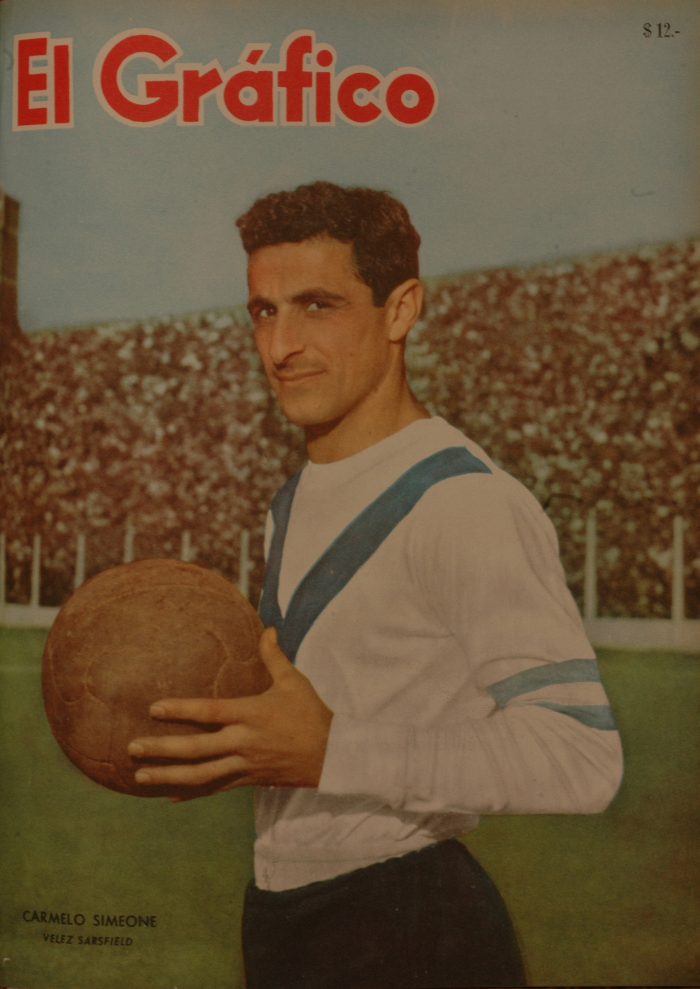 El Grafico del 29 de Noviembre de 1961. Edicion 2199